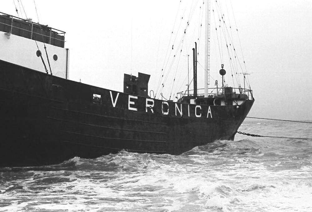 De Nordeney, van zeezender Radio Veronica gestrand te Scheveningen.